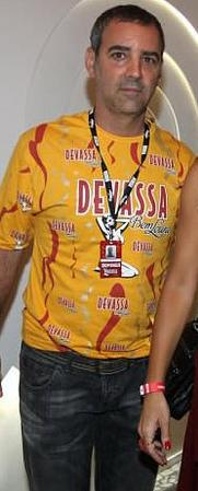 O casal de atores Floriano Peixoto e Christine Fernandes chega a um dos camarotes do Carnaval do Rio de Janeiro.